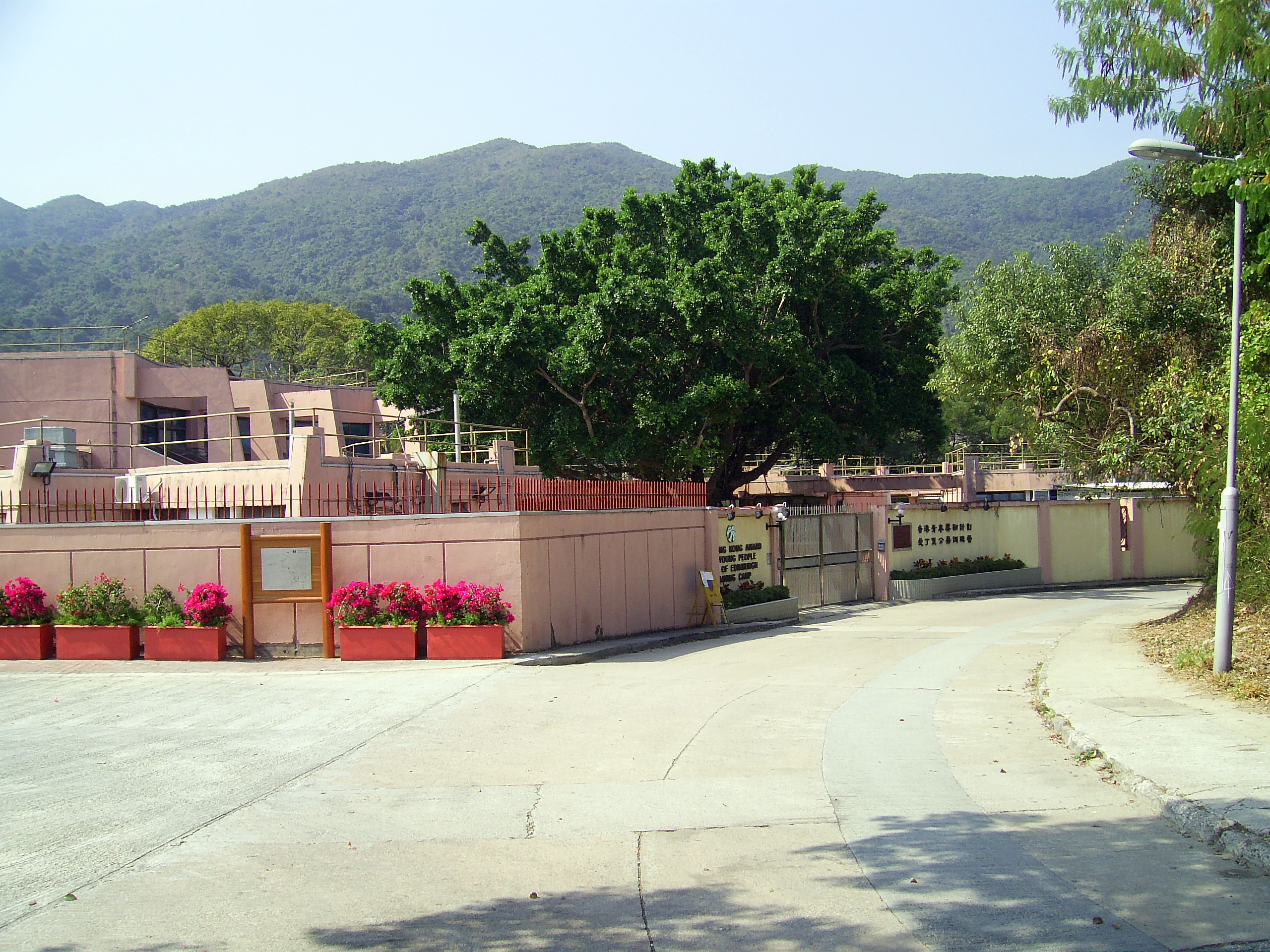 中文（香港）: 愛丁堡公爵訓練營